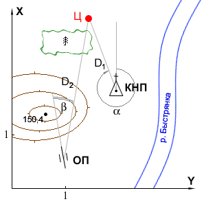 Иллюстрация к статье "Стрельба с закрытых позиций"